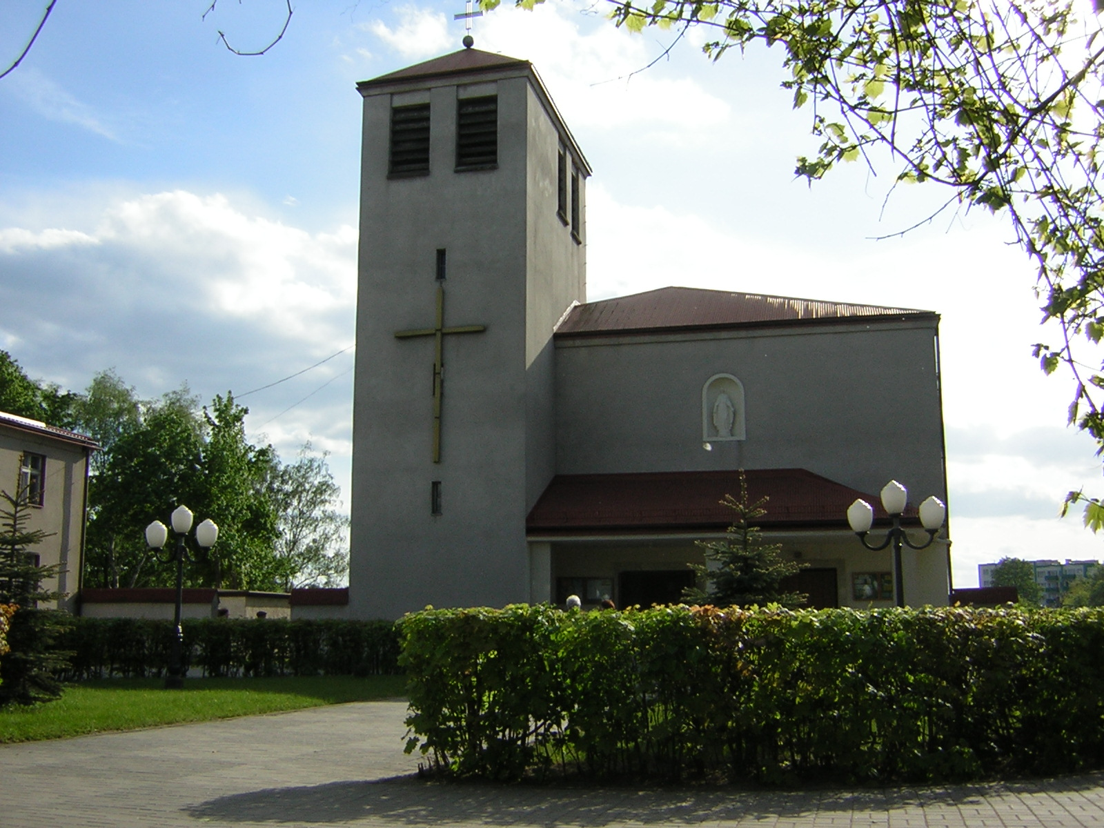 Kościół Niepokalanego Poczęcia Najświętszej Marii Panny w Iławie